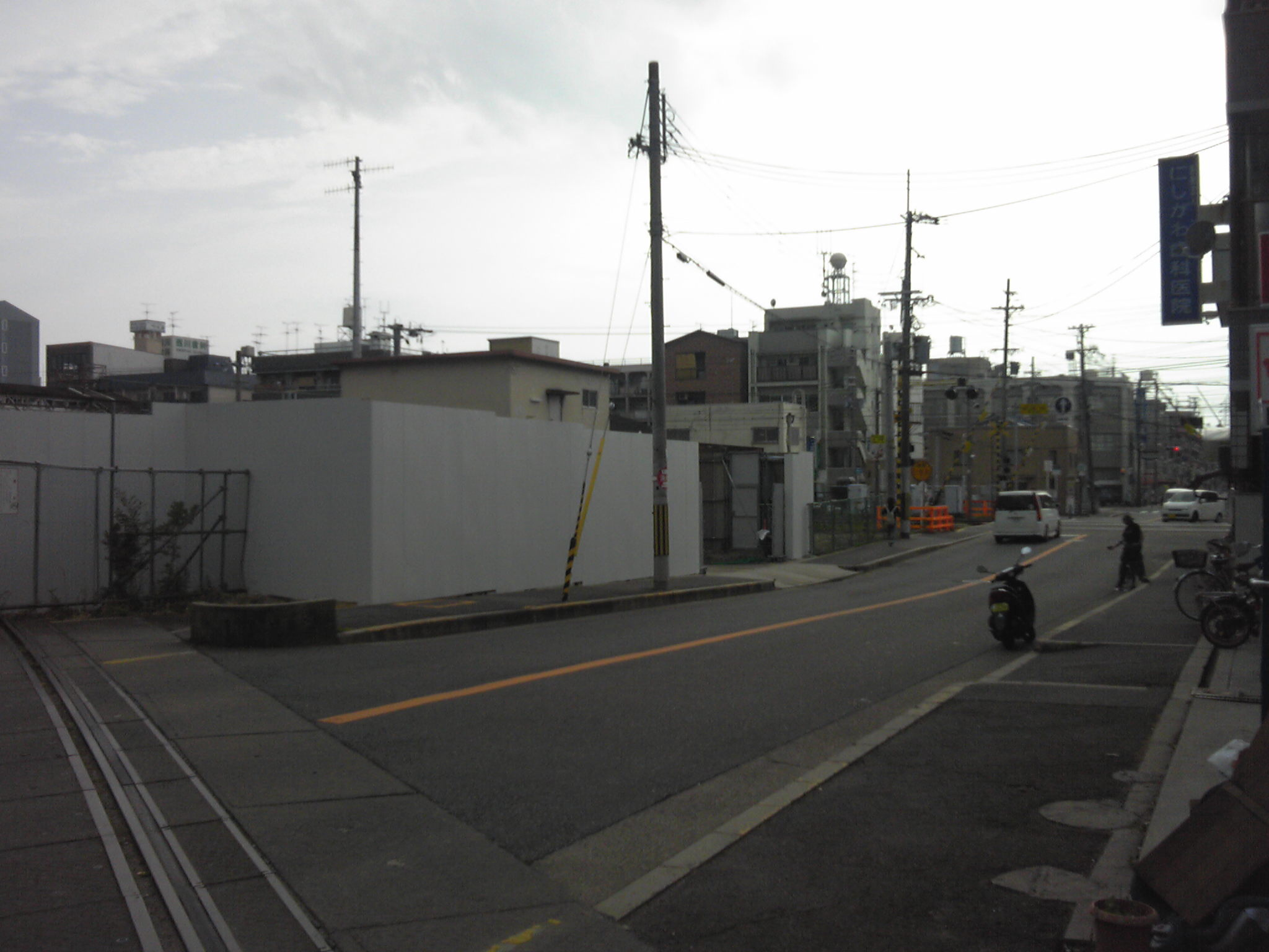 工事中の杉本町駅東口改札（2011-07-04）